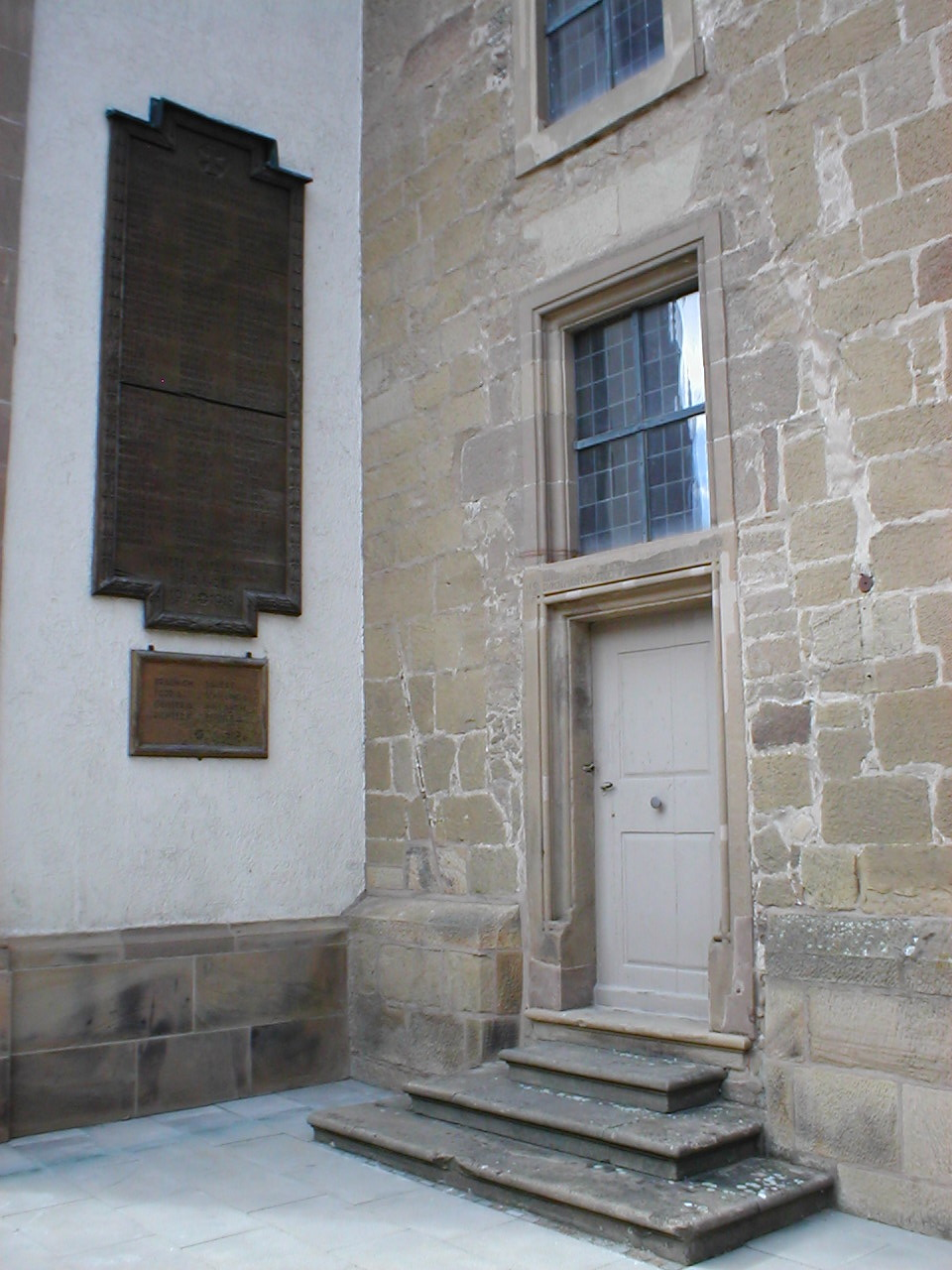 Seitenportal der peterskirche in Neckargartach, datiert 1605. Links daneben Gedenktafel für die Gefallenen 1914-18